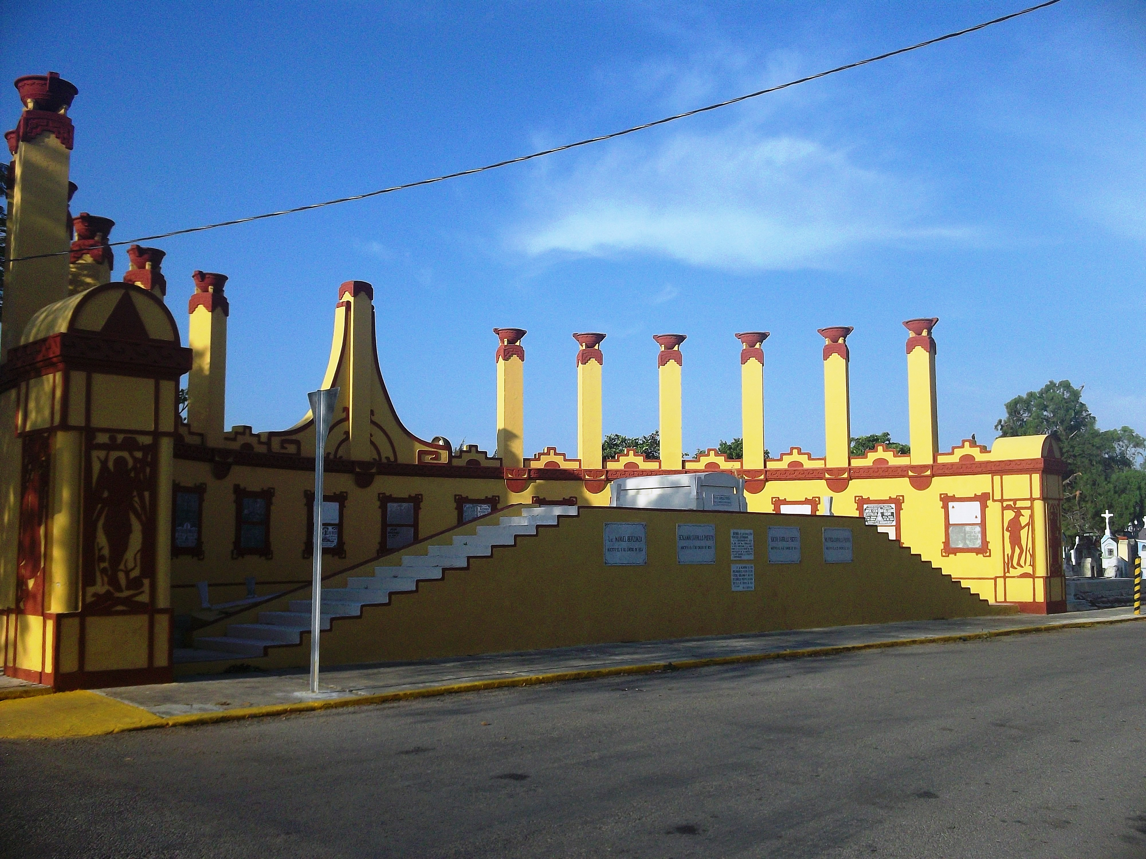 Monumento a Felipe Carrillo Puerto, Cementerio General, Mérida, Yucatán.